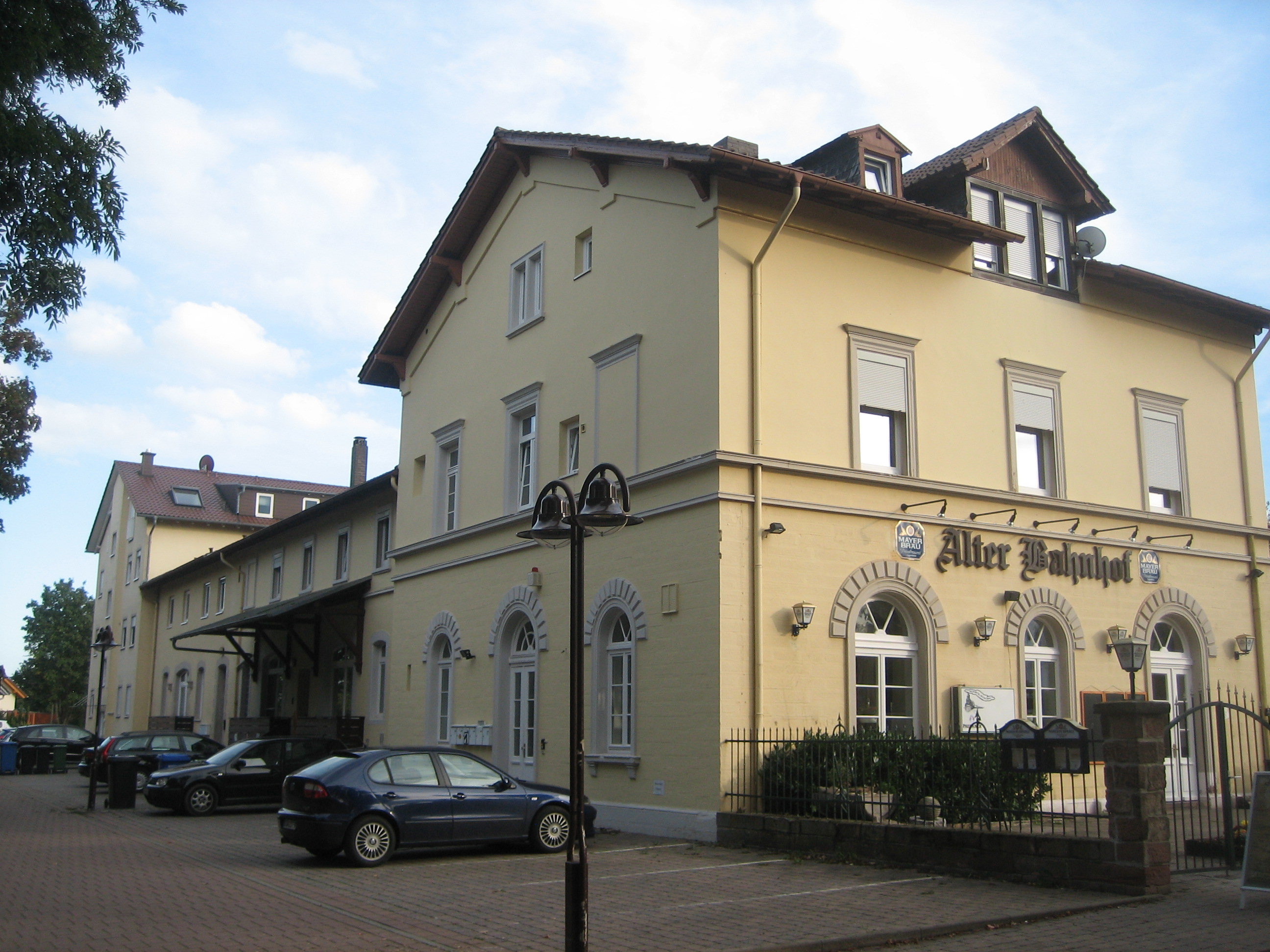 Bezeichnung: Bahnhof Lage: Bahnhofstraße 1 Ort: Kirchheim an der Weinstraße Bauzeit: 1873 Beschreibung:Ehemaliger Bahnhof, spätklassizistischer Typenbau